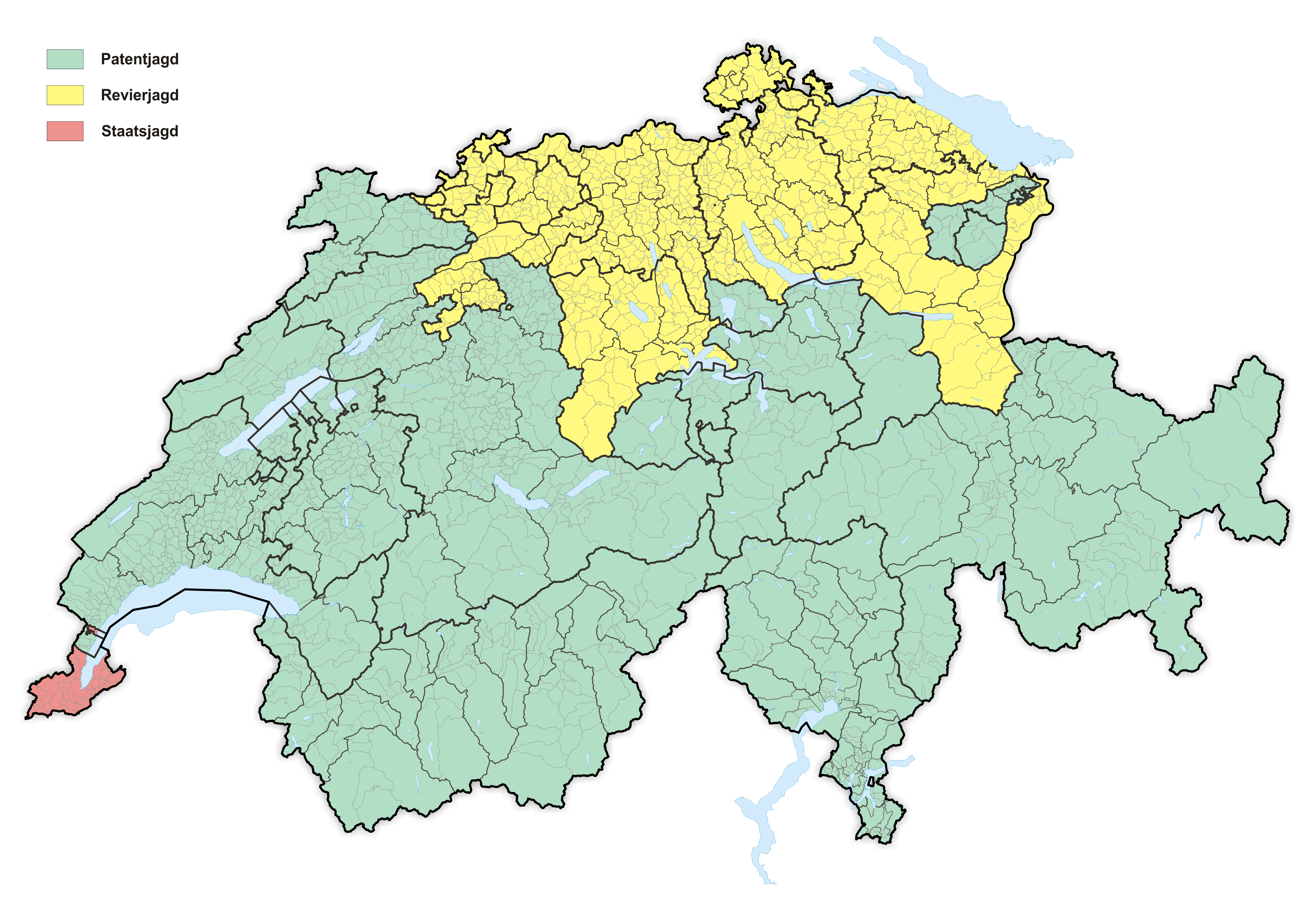 Jagdrechte in der Schweiz